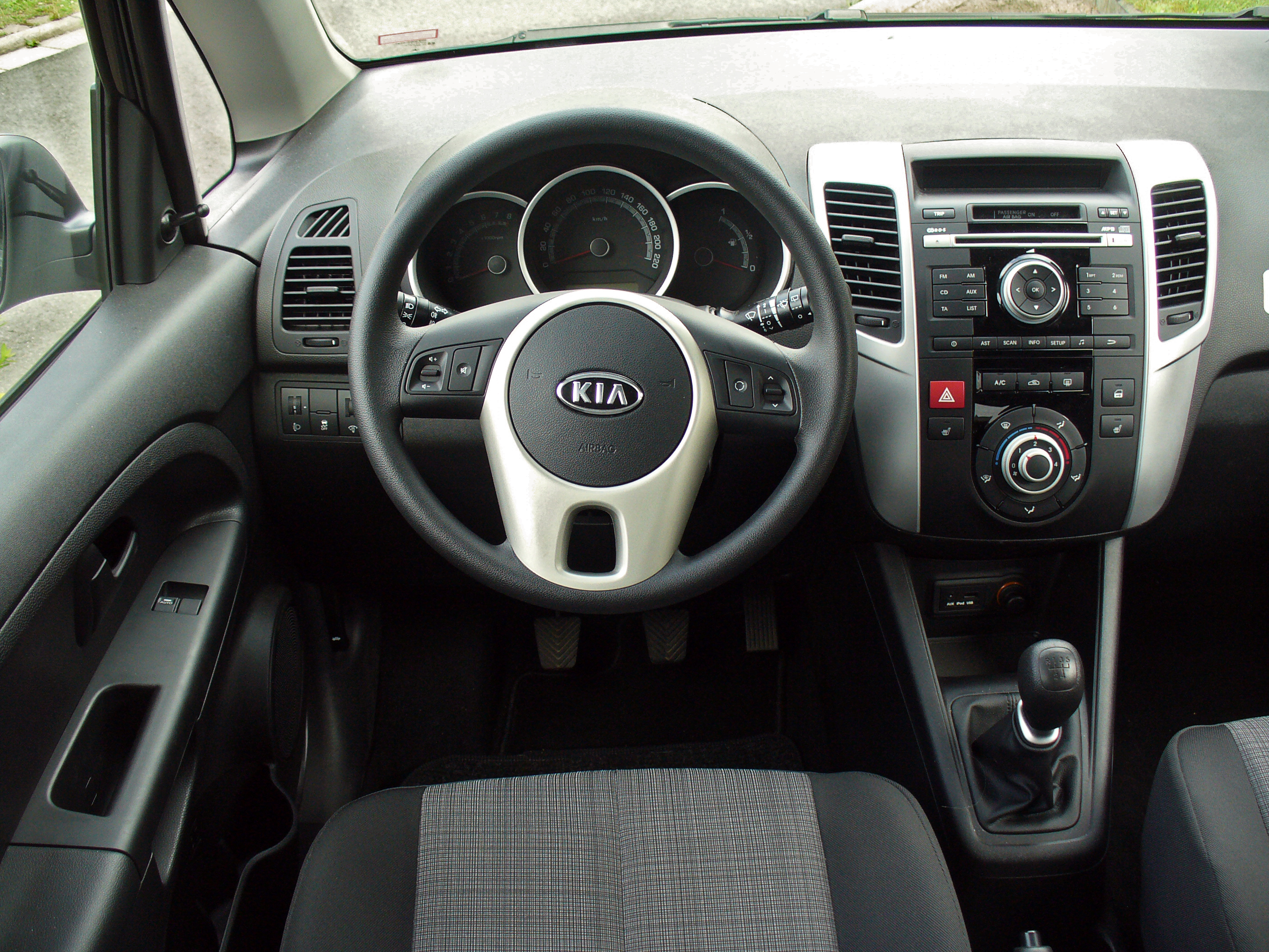 Kia Venga